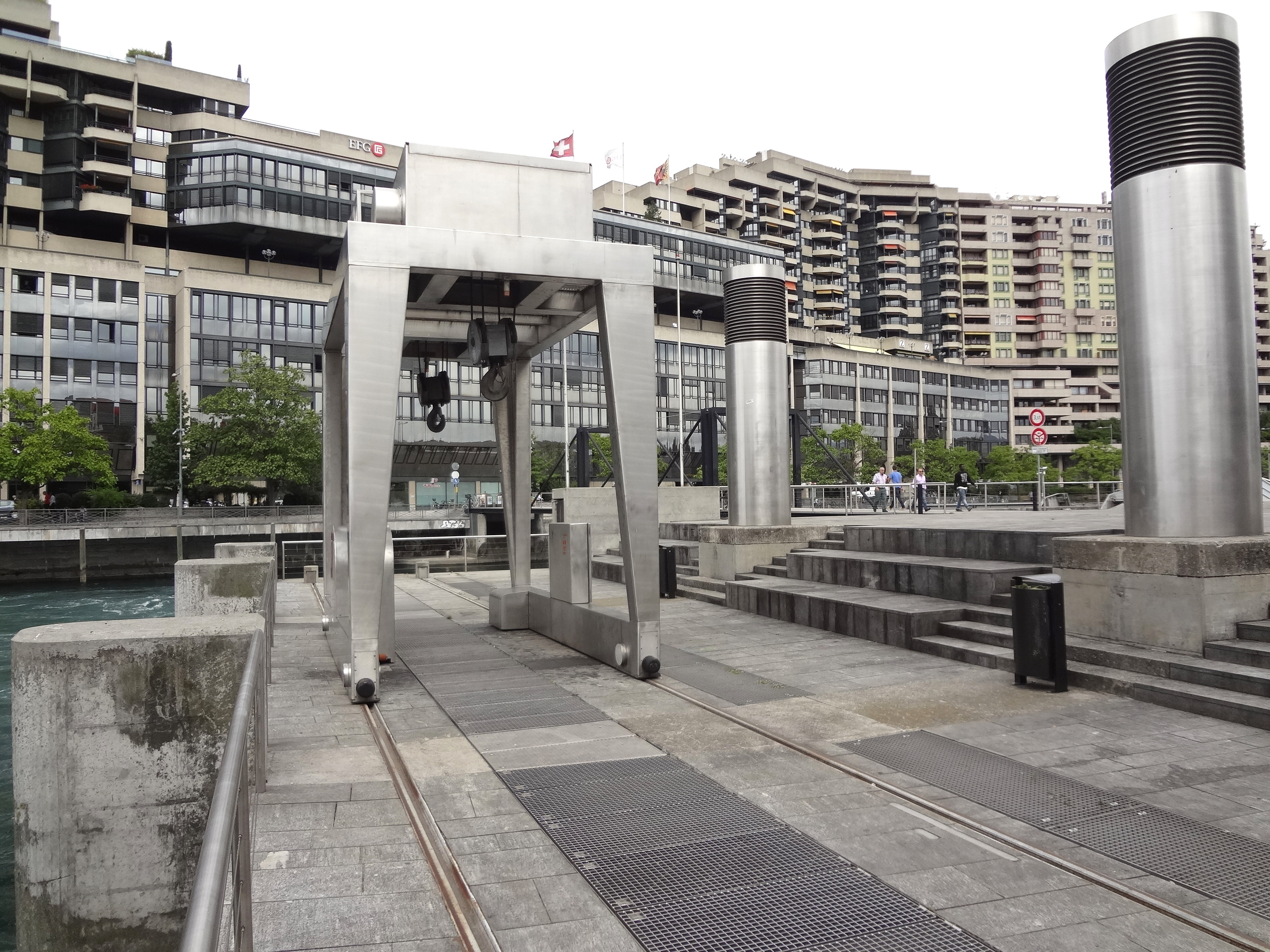 Barrage hydroélectrique du Seujet, Genève - installations sur le barrage.